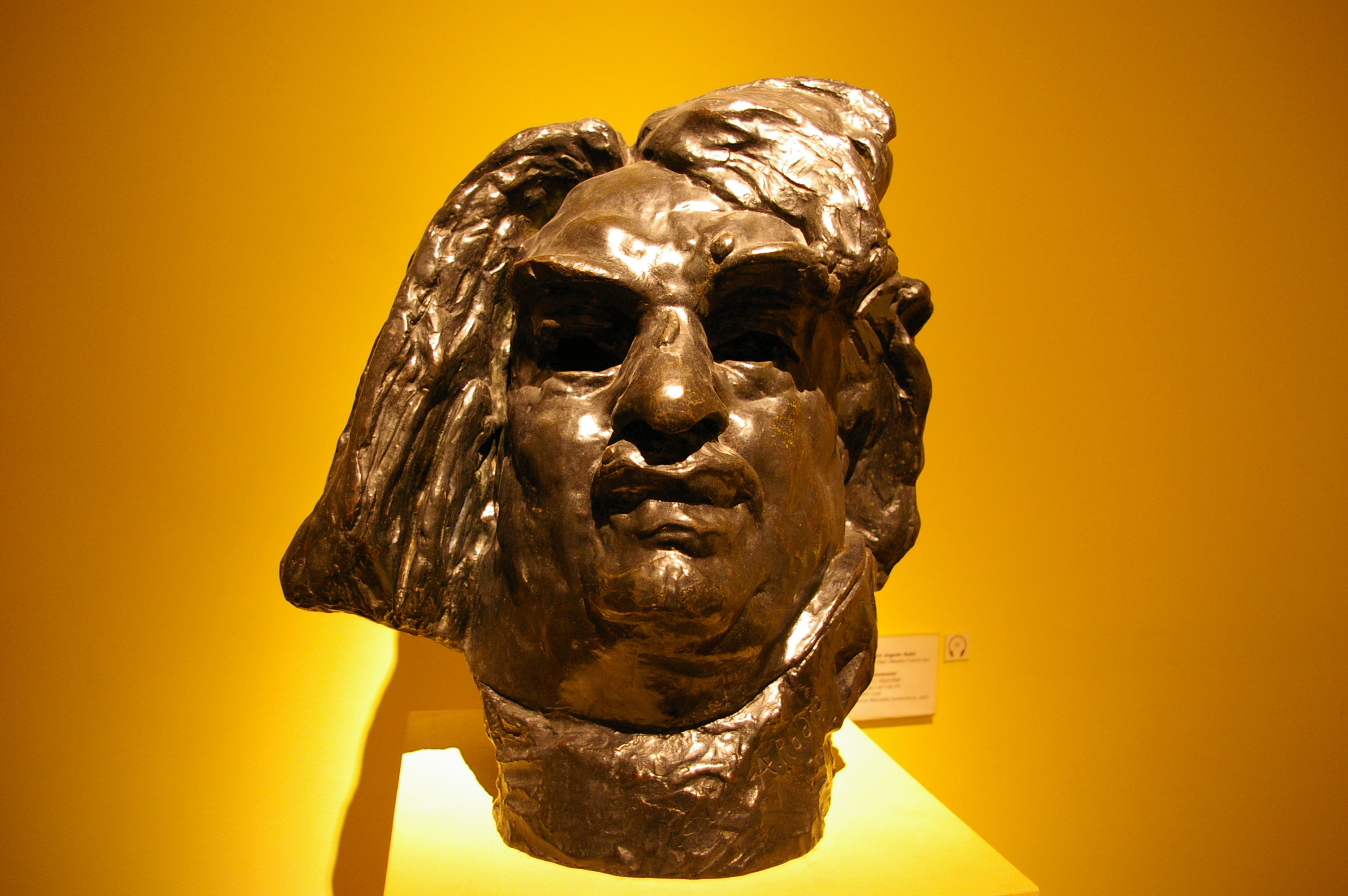 Tête monumentale de Balzac, c. 1890-1898. Bronze.